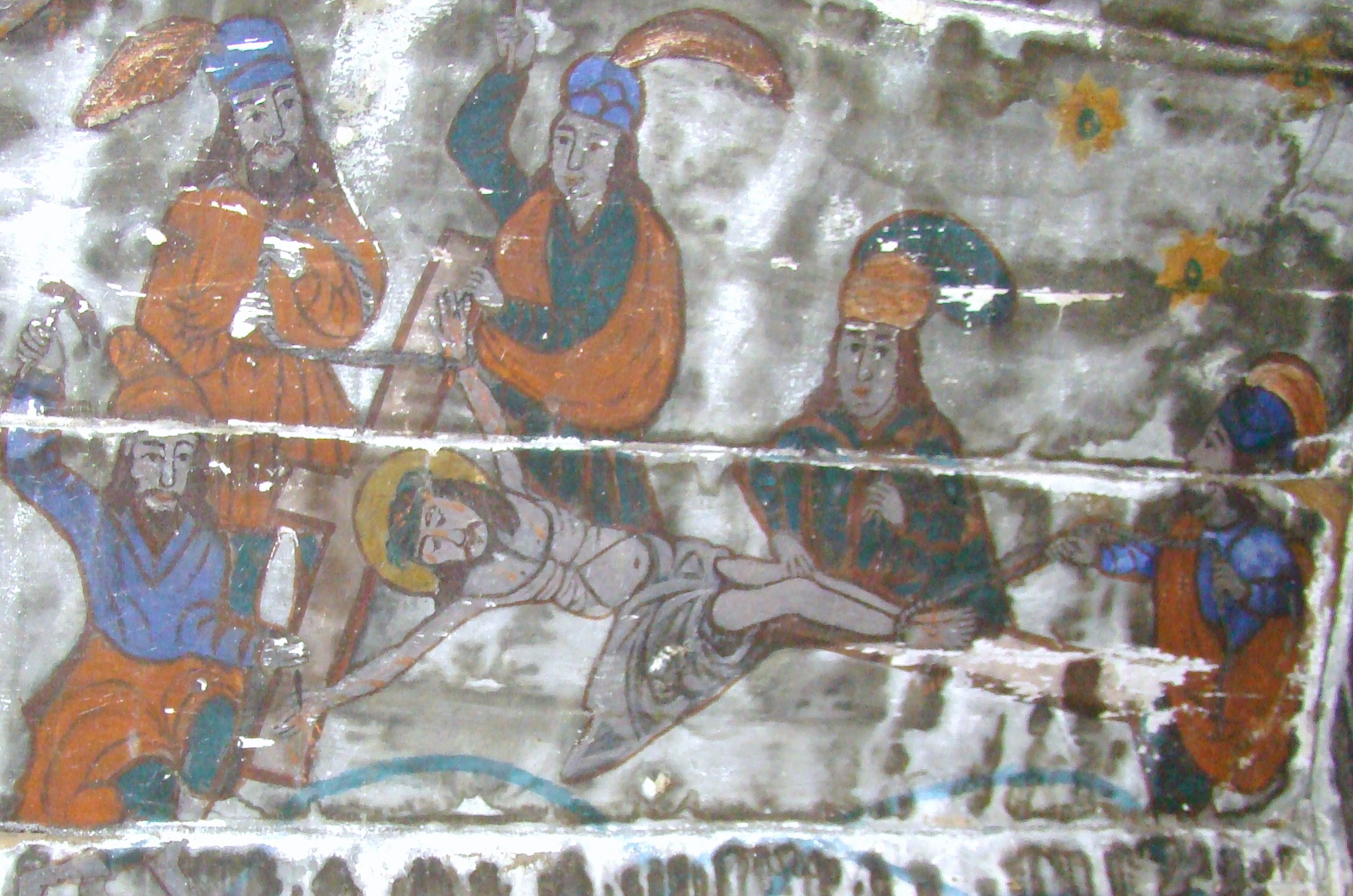 Biserica de lemn "Sfinții Arhangheli Mihail şi Gavriil, sat CALNA; comuna VAD, județul Cluj